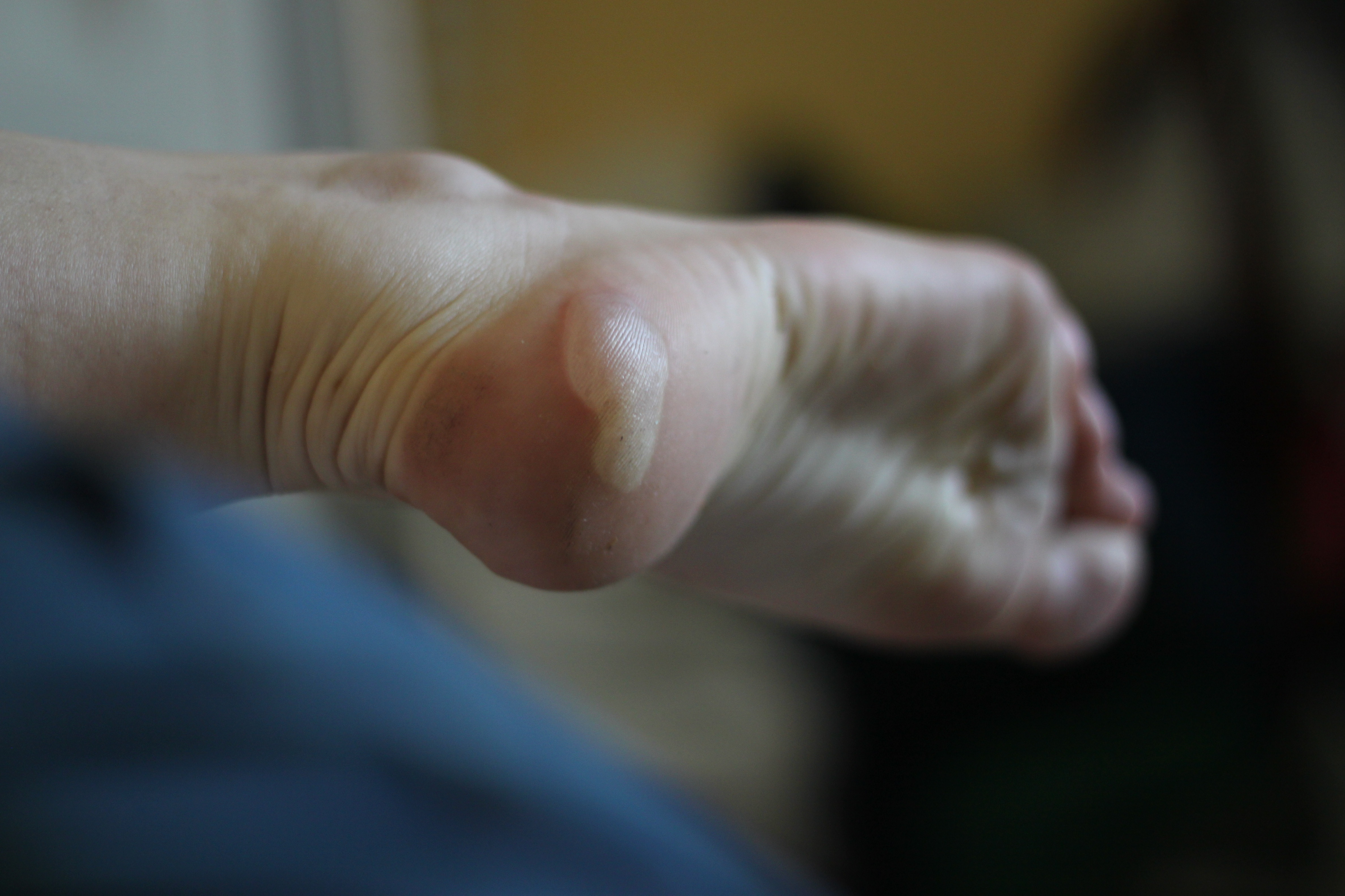 Ampoule sur le pied d'une humaine de 19 ans.